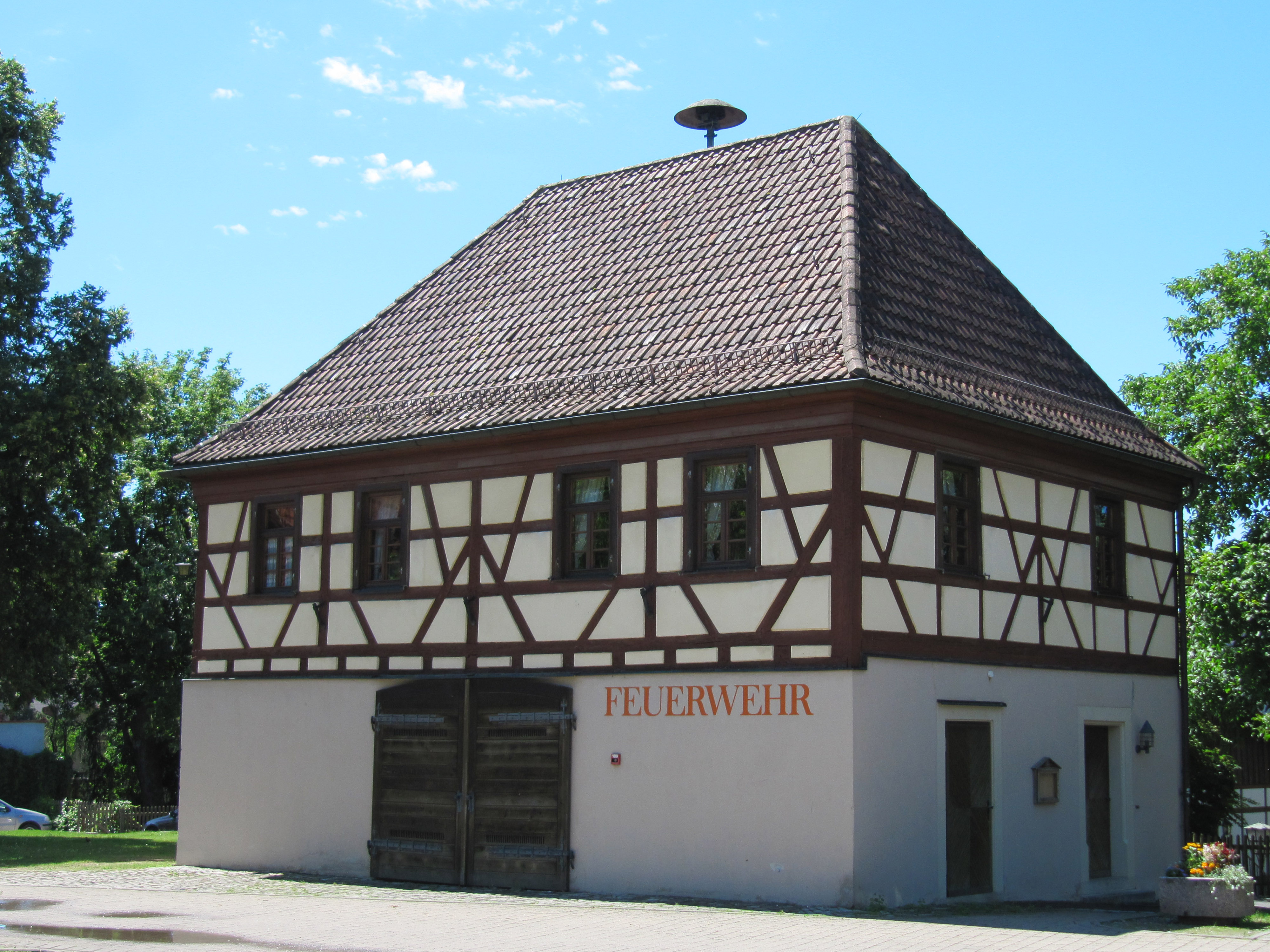 Das alte Feuerwehrhaus von Mainbernheim ist Blickfang auf dem Parkplatz an der Schützenstraße.